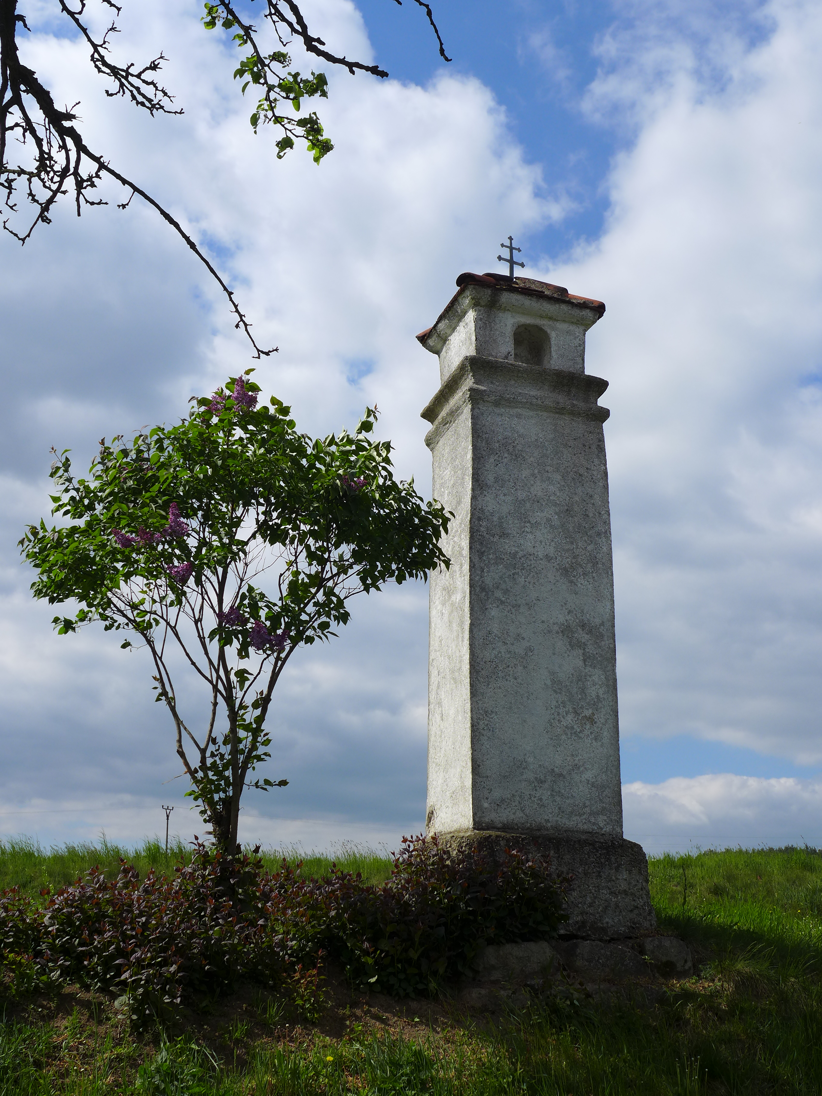 Boží muka (Studnice), za vsí, Studnice